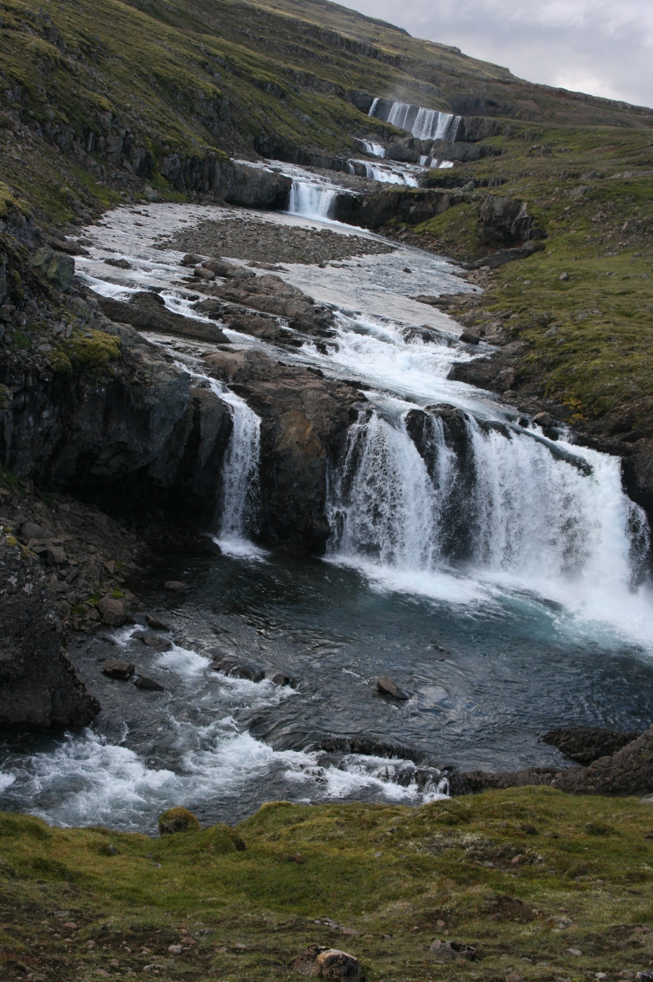 Í einum fossinum átti víst að hafa verið "Nikur" mikill